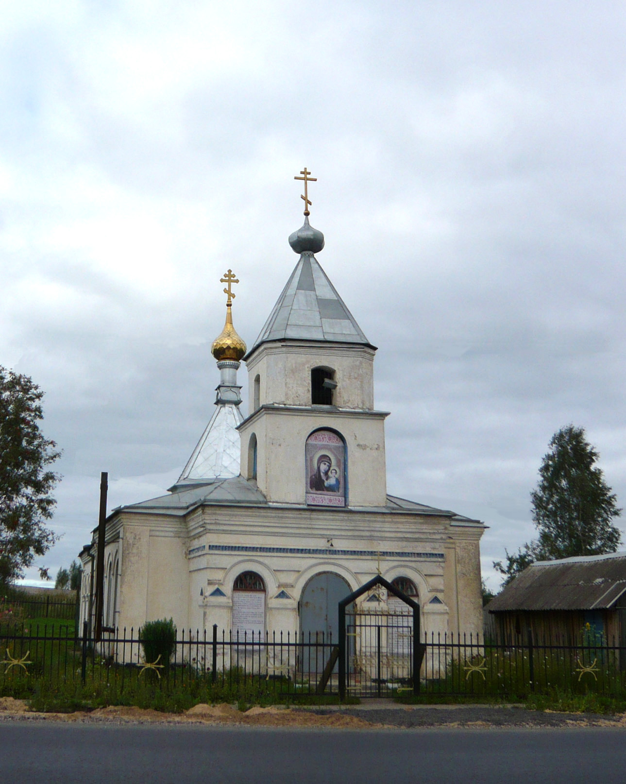 Казанская церковь, село Марьино Тверской области